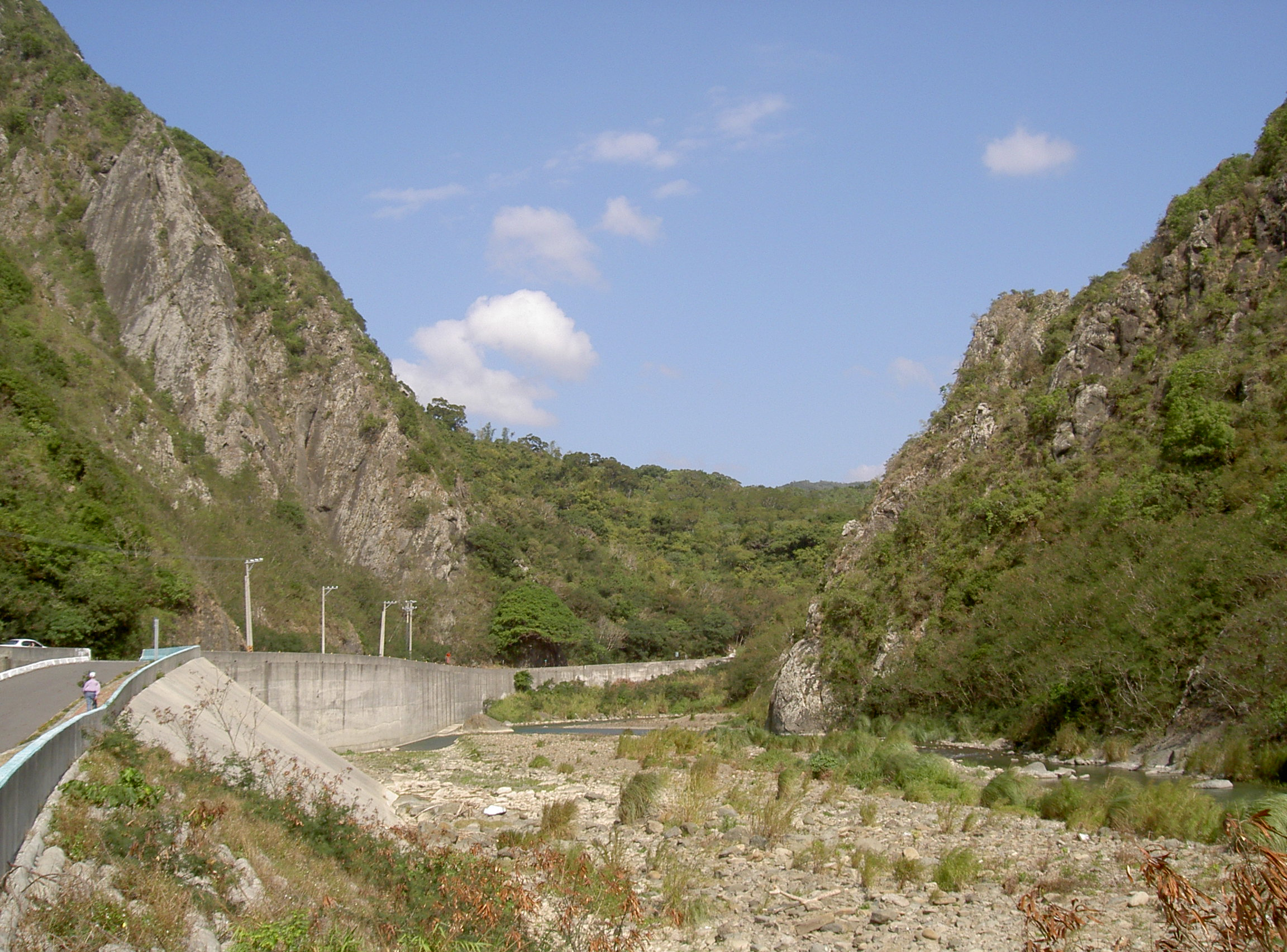 屏東縣車城鄉石門古戰場